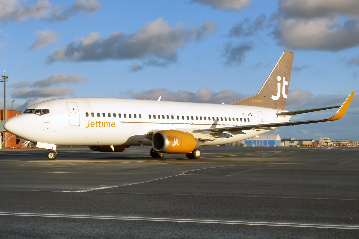 Jet Time, OY-JTE, Boeing 737-3L9